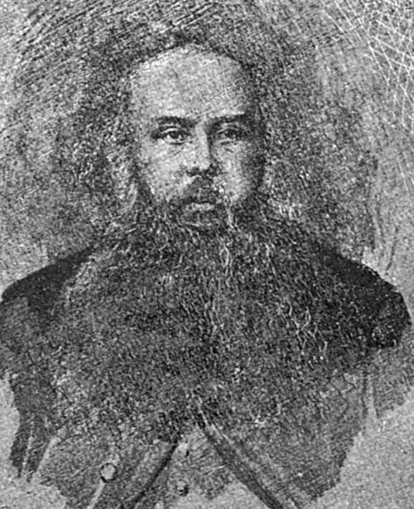 Борейша Пётр Антонович, предприниматель